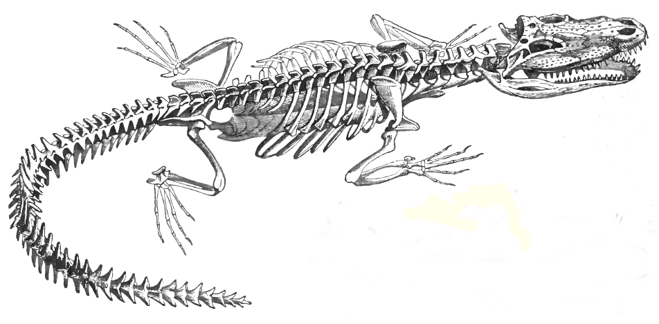 Crocodyle skeleton